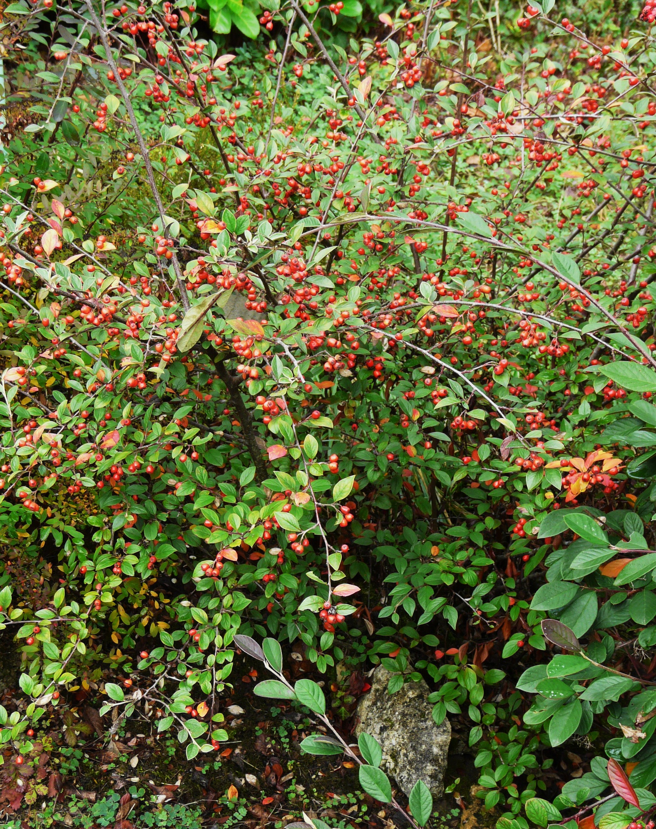 Buisson de Cotonéaster de Franchet (Cotoneaster franchetii) à l'automne, Dordogne, France